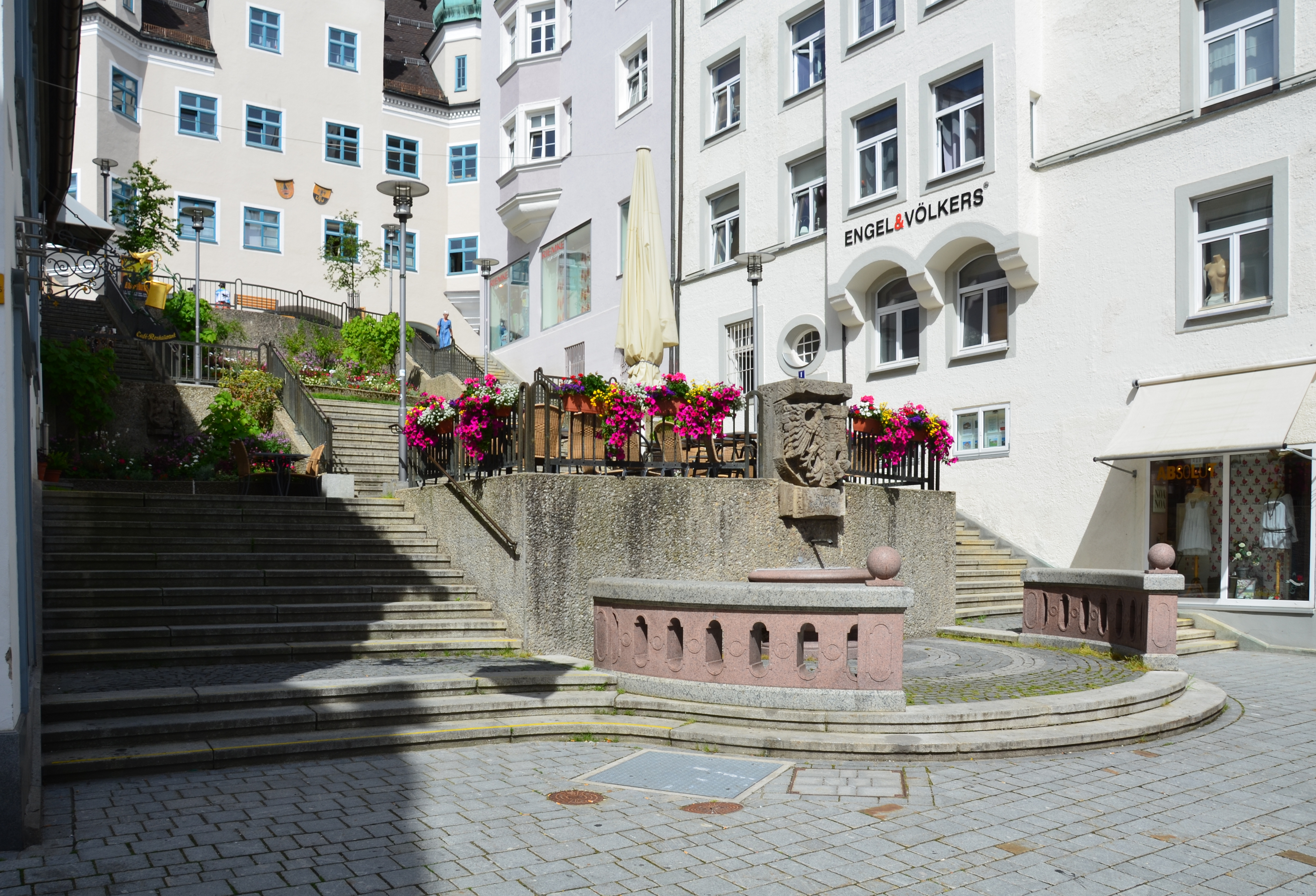 Fraitreppe in Kempten